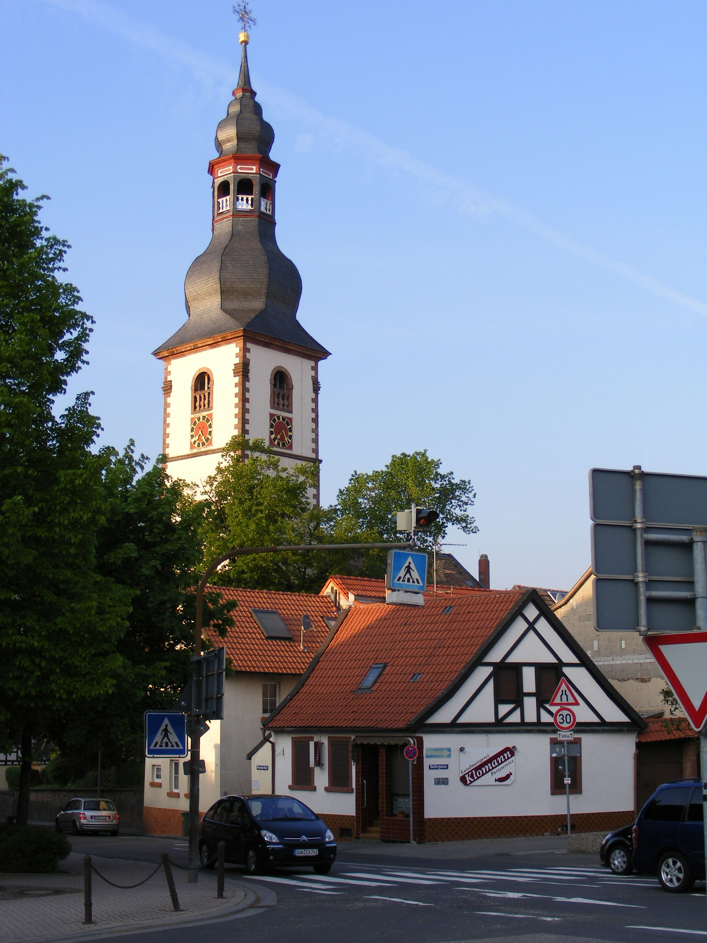 Protestantische Kirche St. Andreas in Kirchheim an der Weinstraße